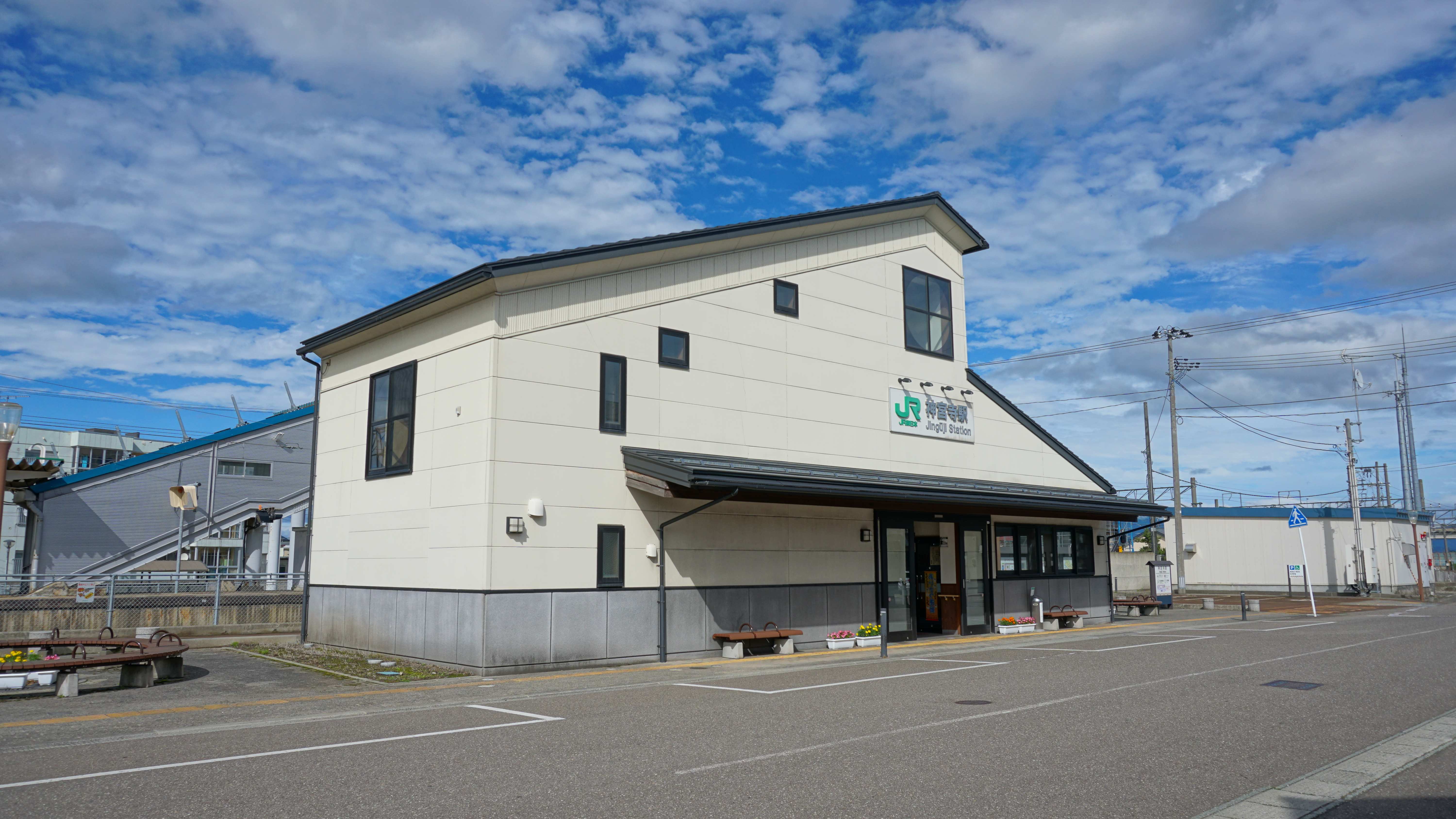 奥羽本線 神宮寺駅（秋田県大仙市）